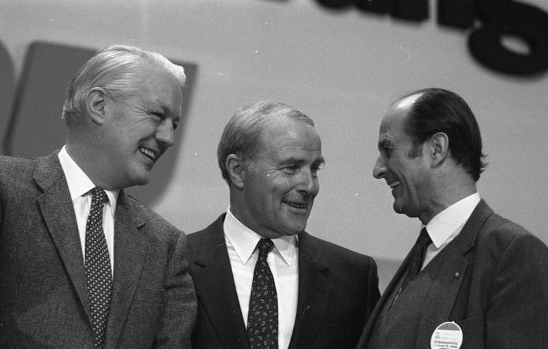 30. Bundesparteitag der CDU in Hamburg im Congress Centrum 2.-5.11.1981